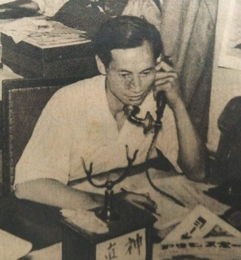 織田幹雄